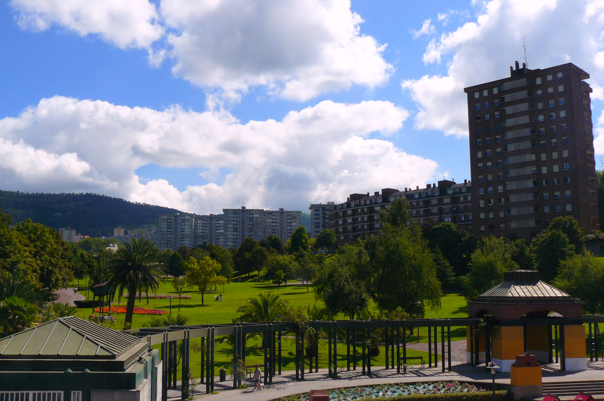 El parque Europa, en el barrio de Churdínaga de Bilbao, España.